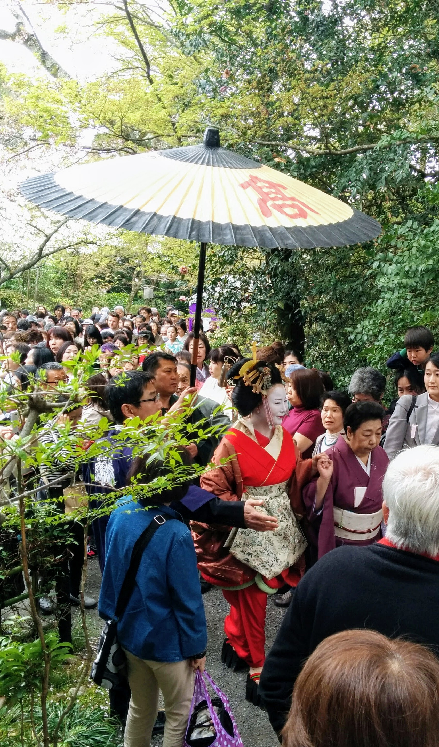 吉野太夫の墓に向かう如月太夫